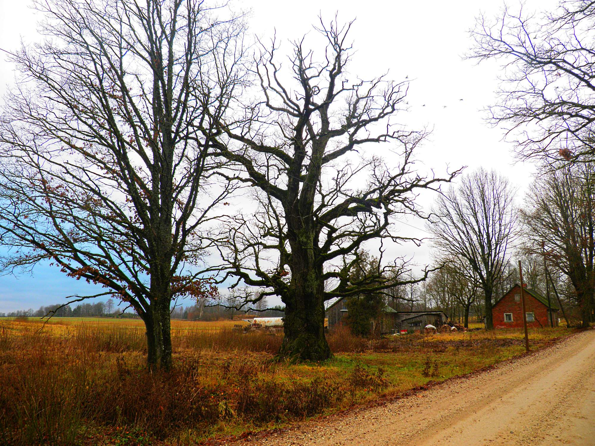 Гагульский дуб | Gāguļu dižozols (1)